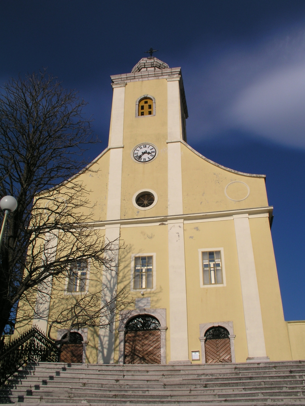 Crkva Svetog Jurja u Hreljinu, Hrvatska